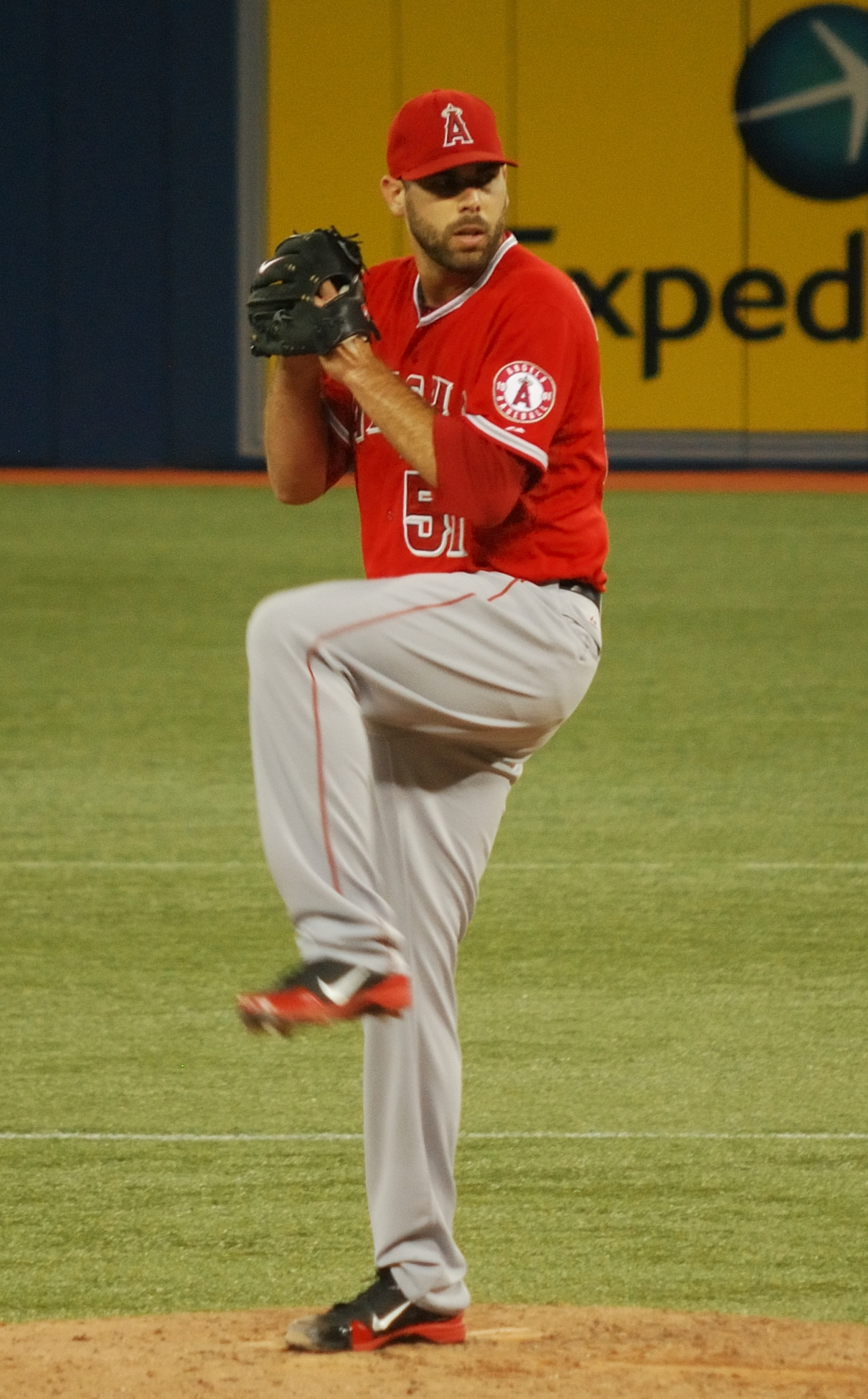 Jordan Walden